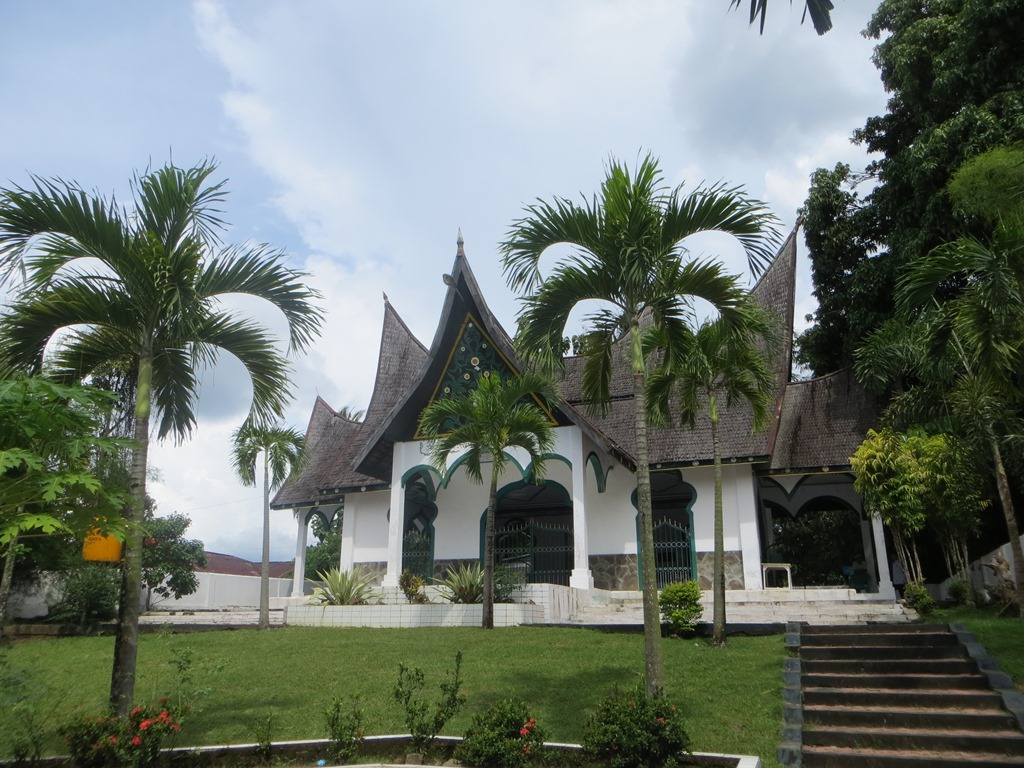 Makam Tuanku Imam Bonjol di Minahasa 5